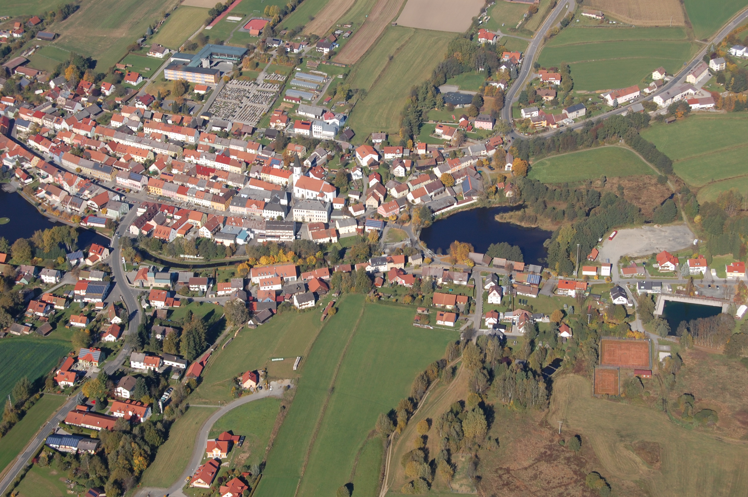 Schönsee, Ortskern (2010)